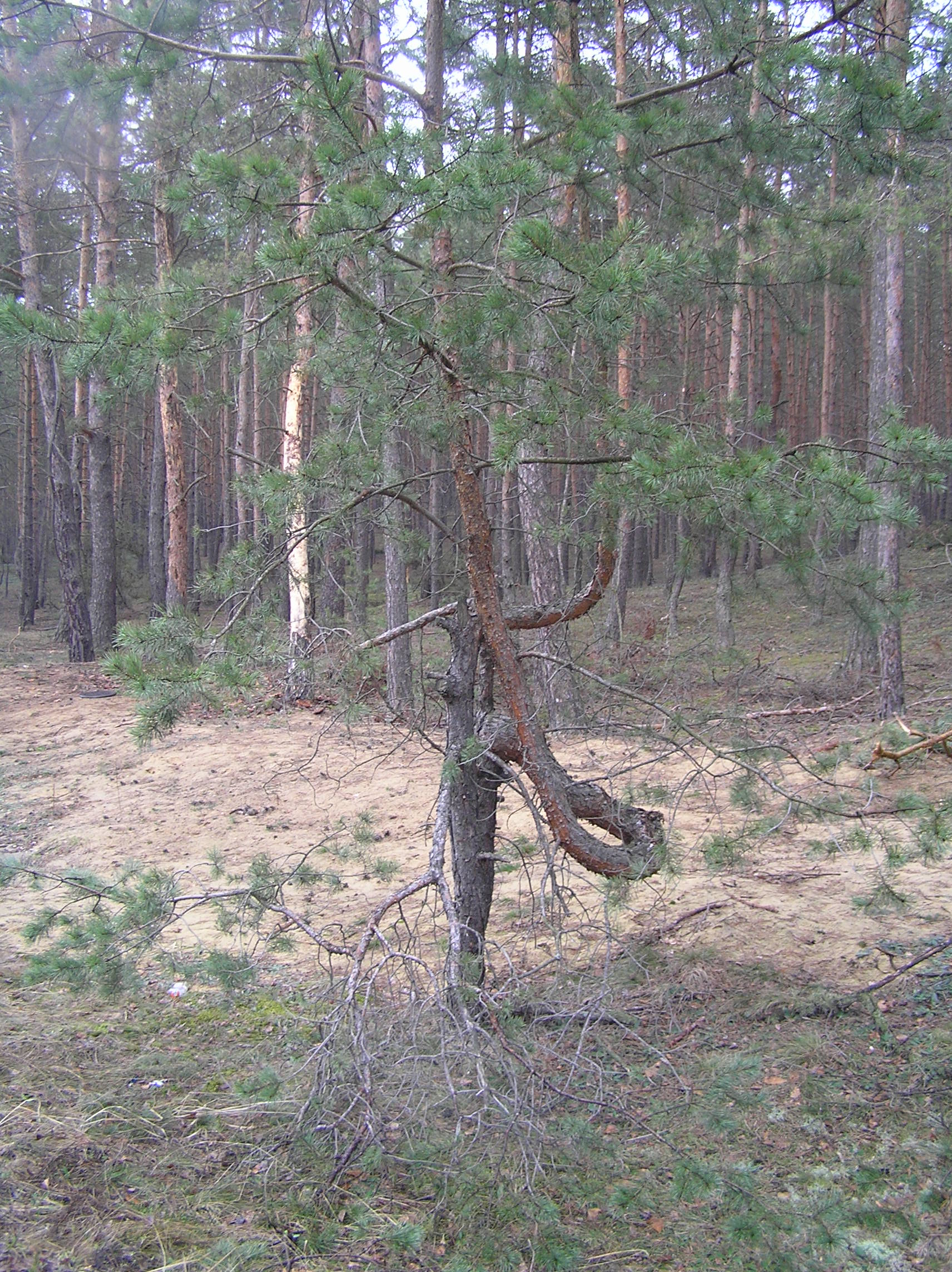 Krzywe drzewo